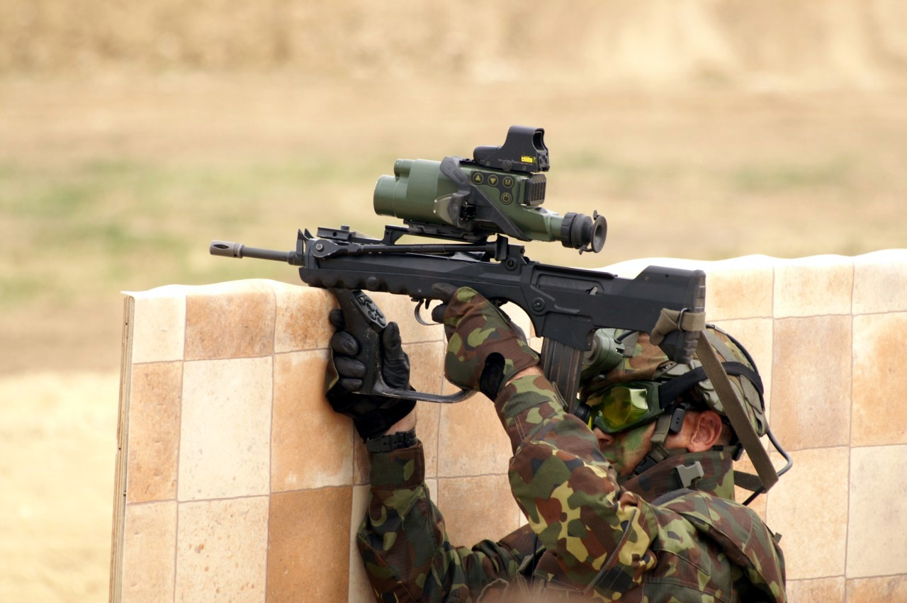 Visierung über Gewehrkamera und Helmdisplay bei FAMAS-FELIN